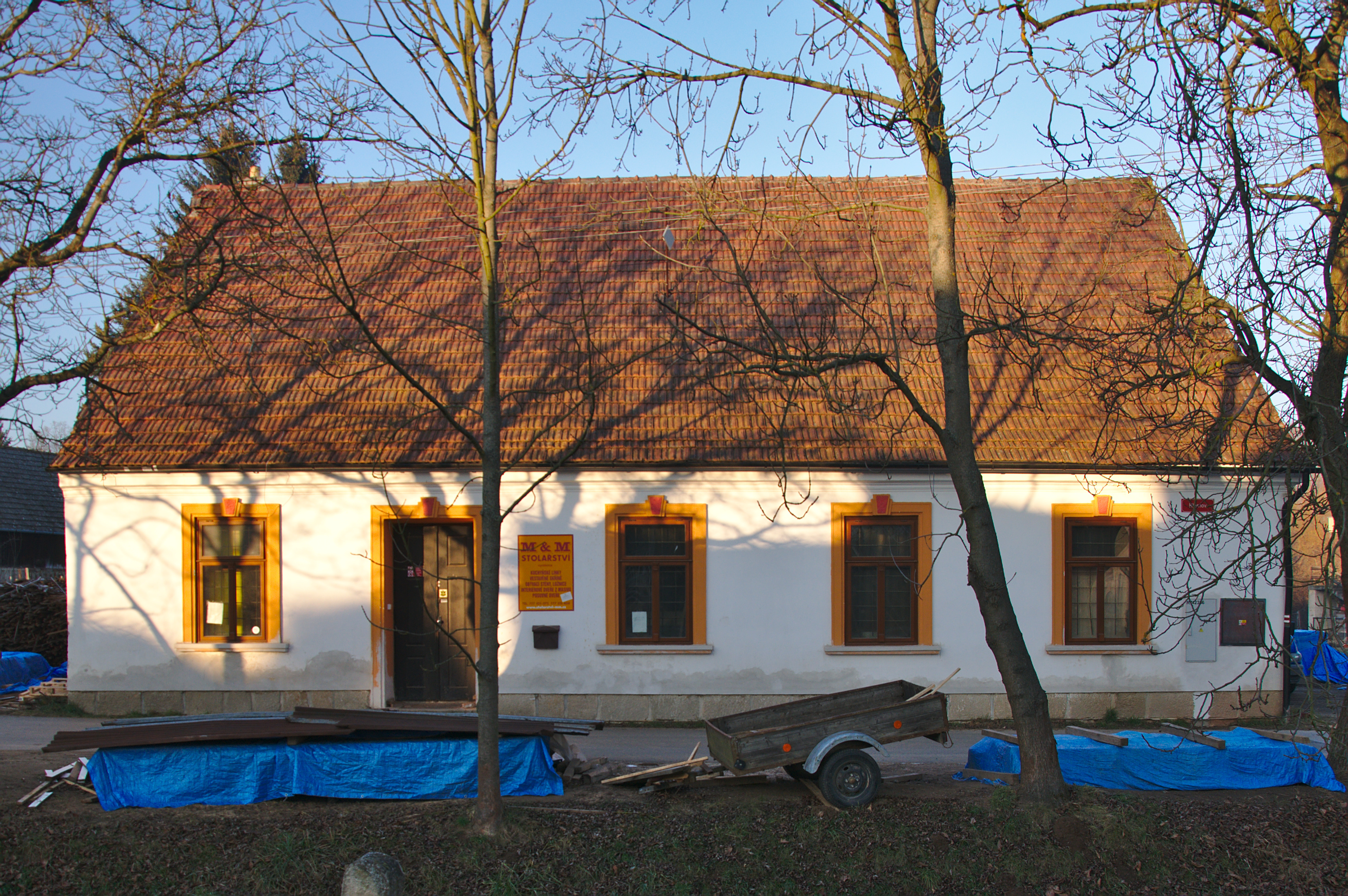 Starý dům, Klemov, Doubravice nad Svitavou, okres Blansko